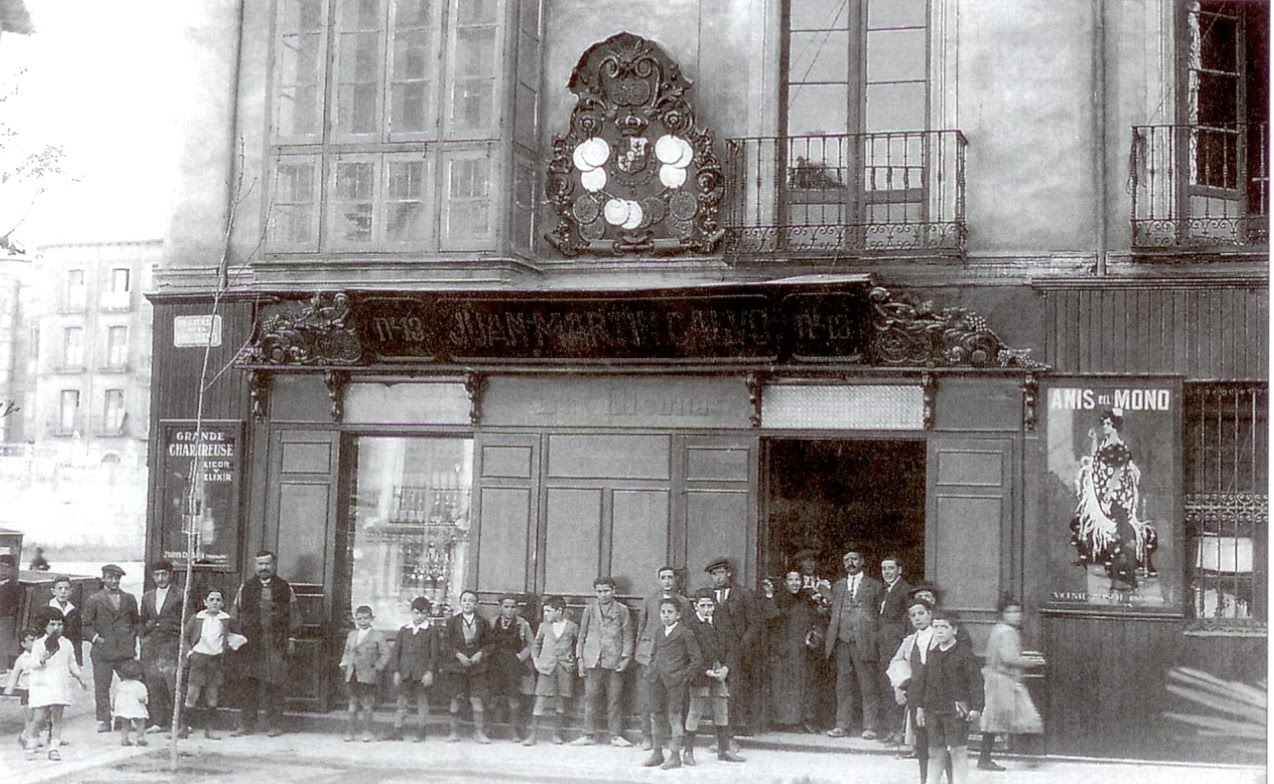 Fotografía en blanco y negro de El Penicilino, cuando se llamaba "Villa Elenita"